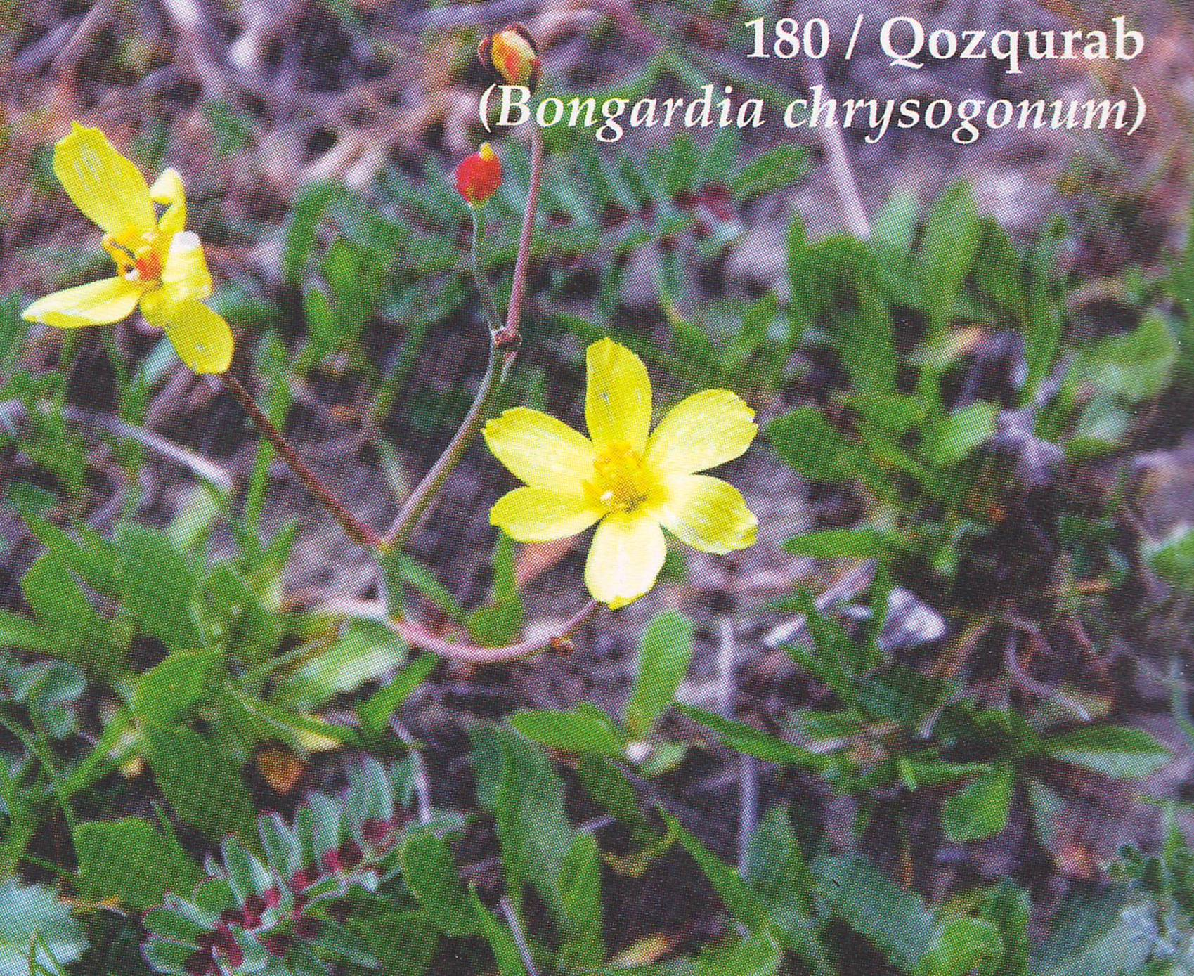 Kürdəmir Qozqurab